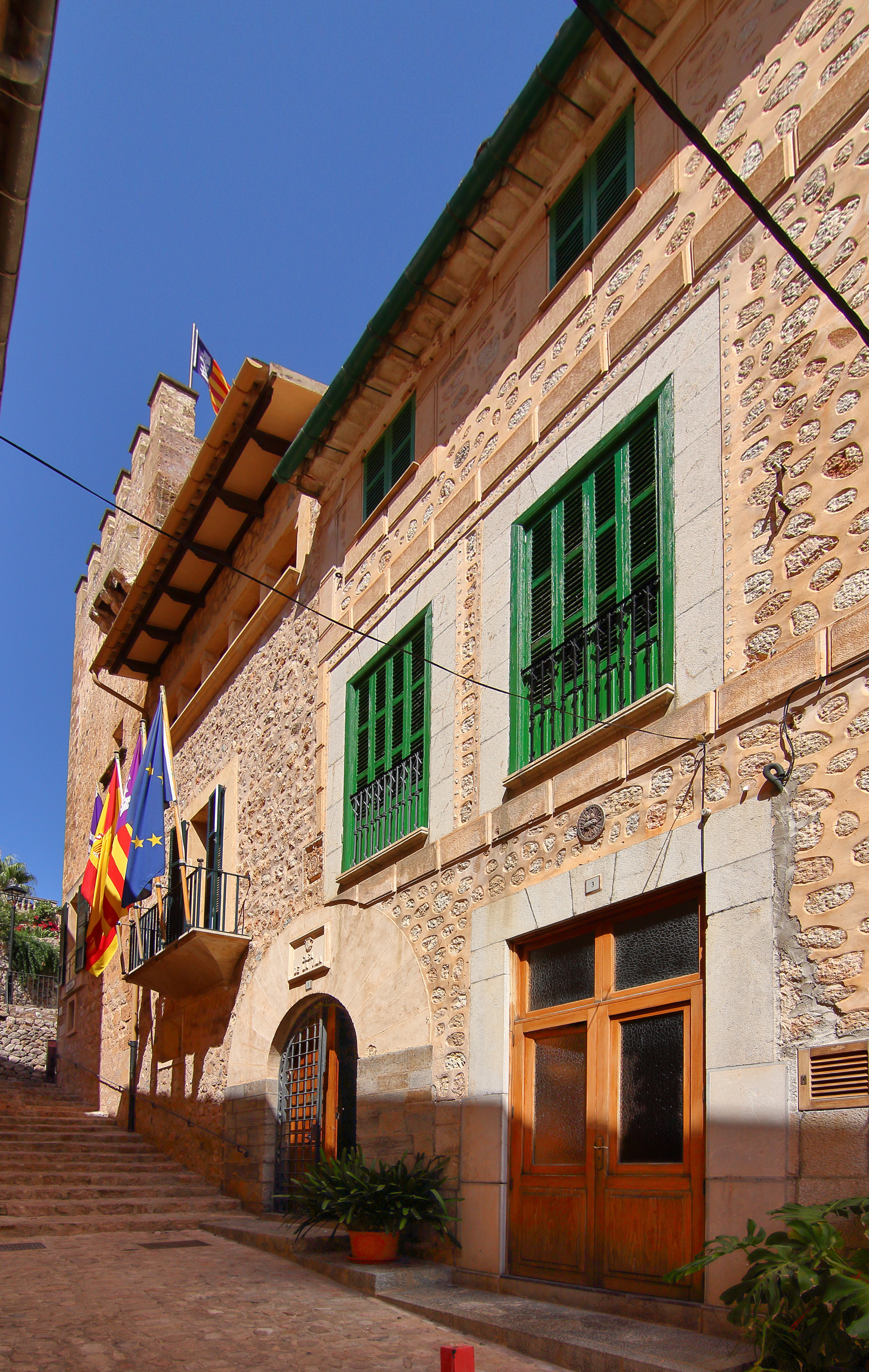 Fornaltx, Ayuntamiento